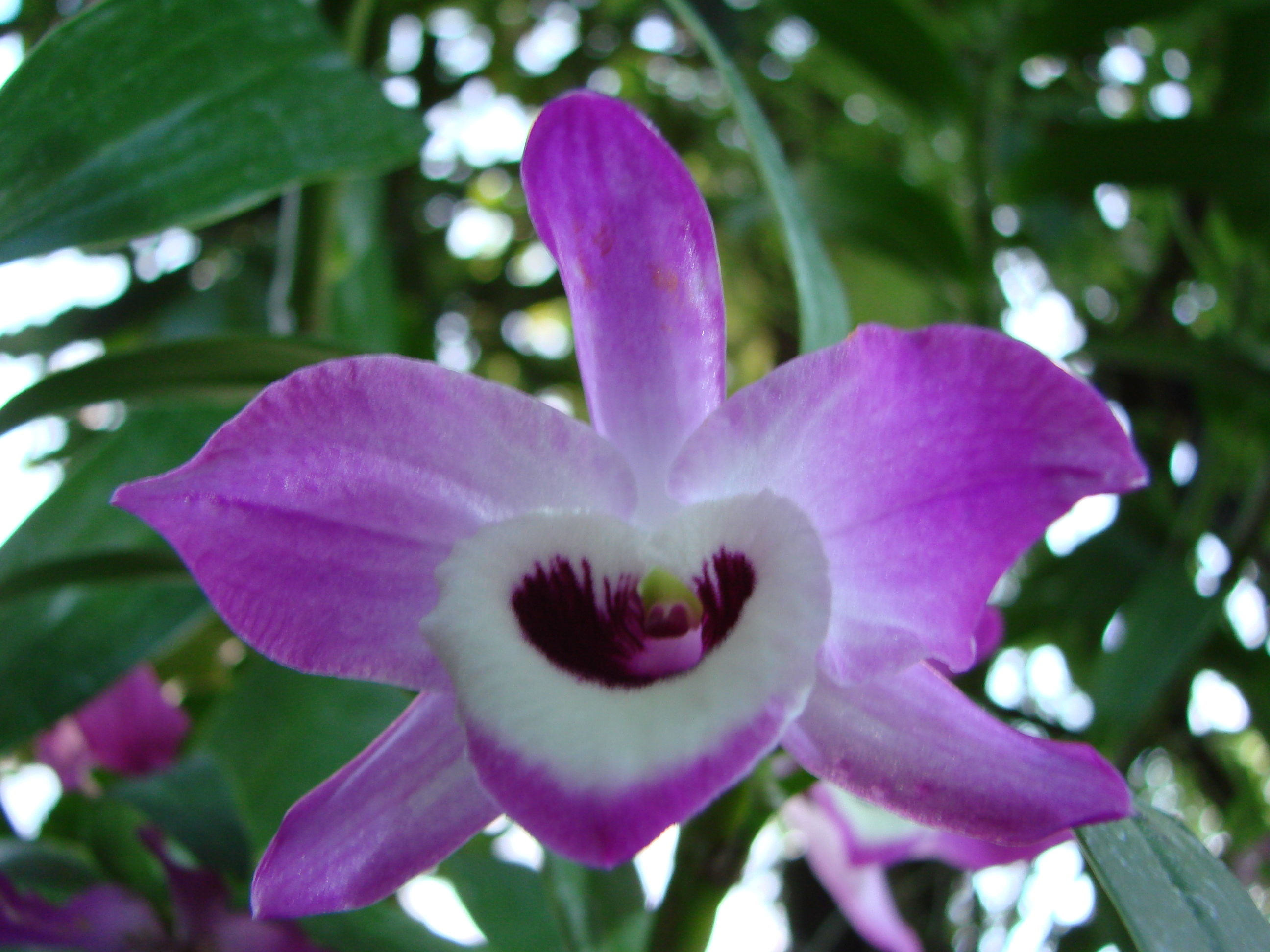 Jardin botanique de l'Université de Zurich (Suisse) : Dendrobium nobile Lindl. (1830)